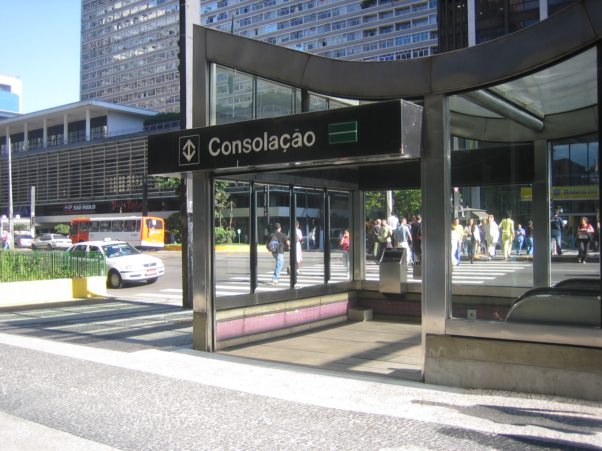 Exterior da estação Consolação do metrô de São Paulo.